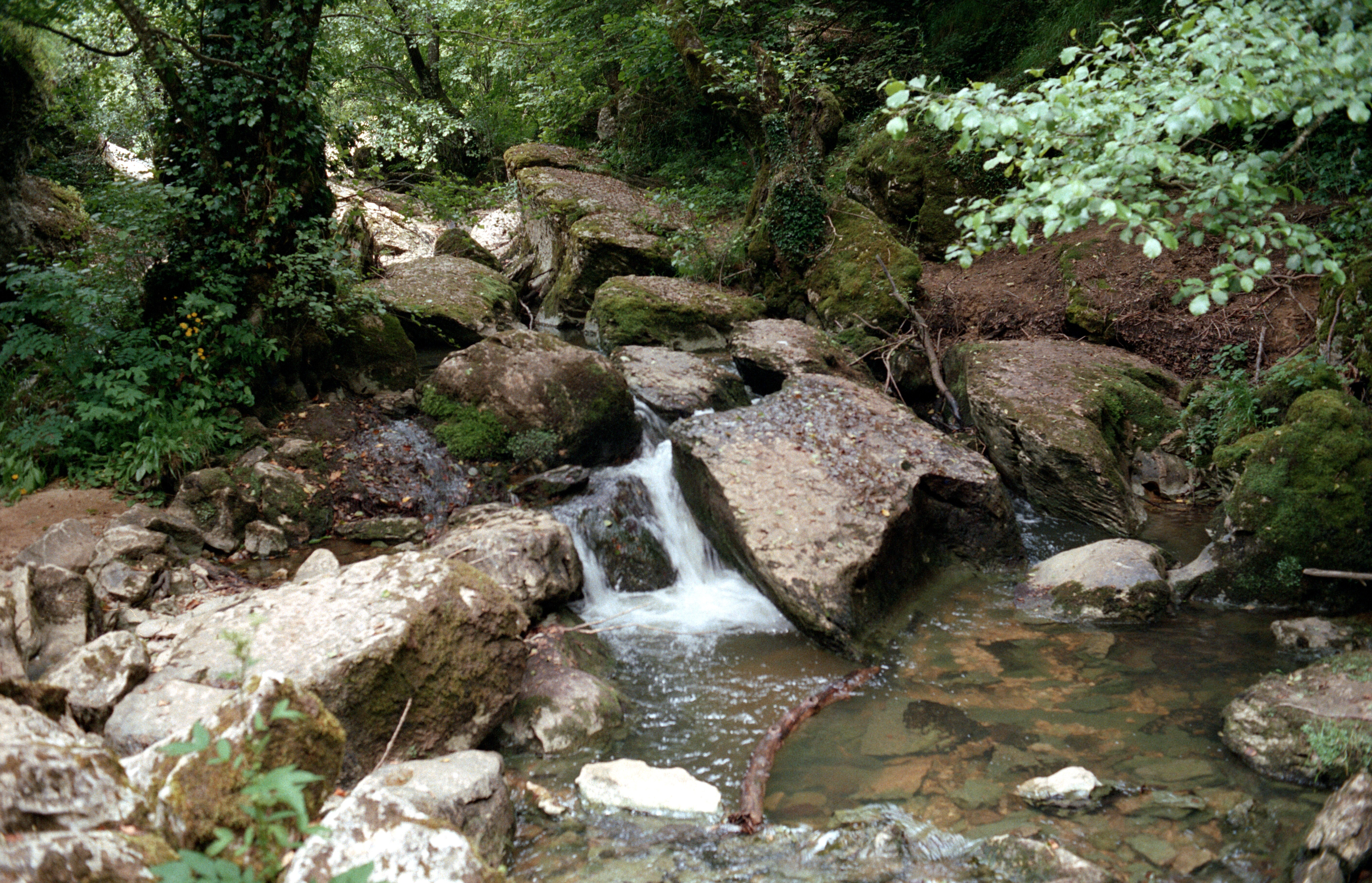 Ojo Guareña